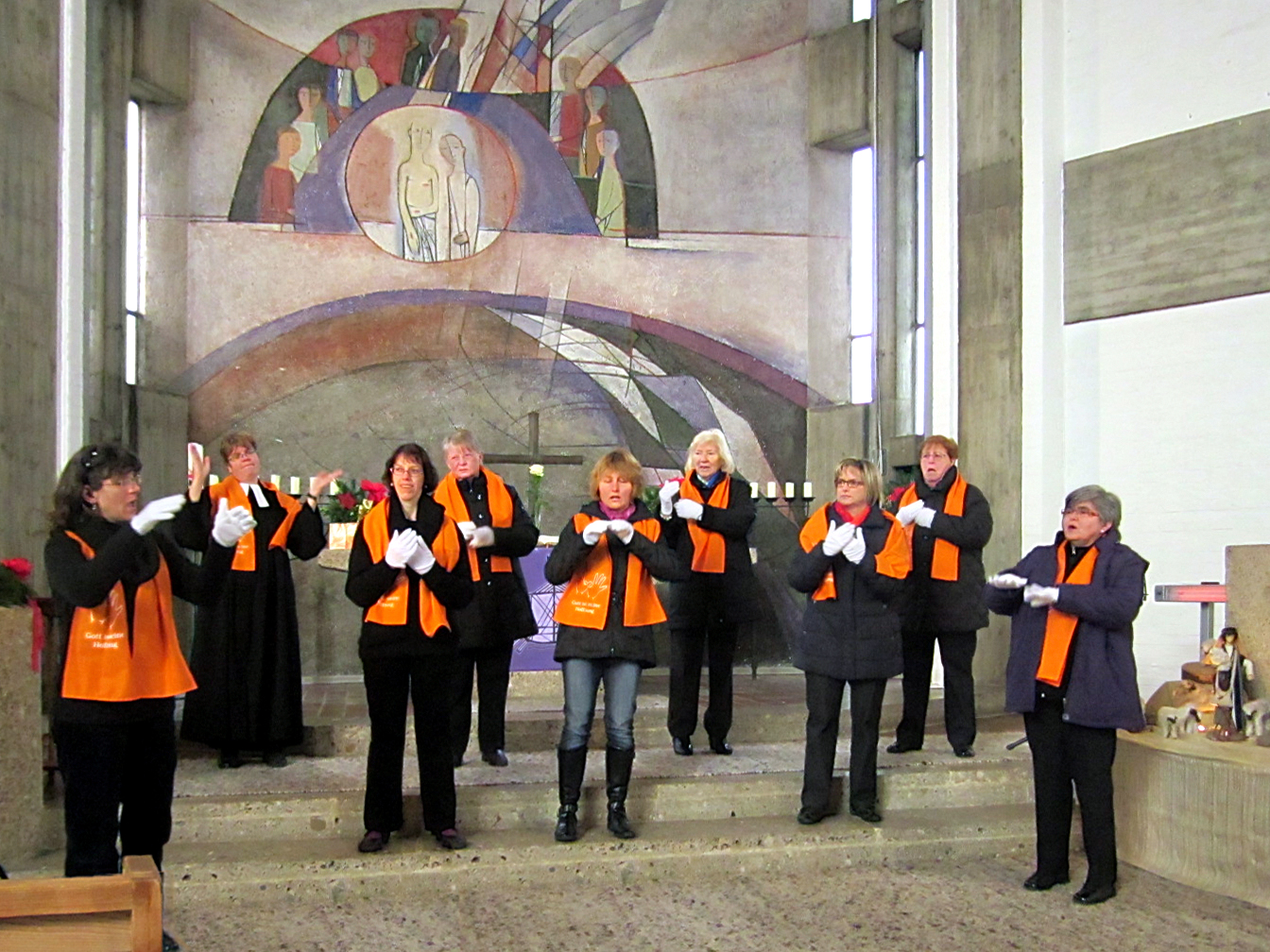 Auftritt des Ökumenischen Gebärdenchors Augsburg am 8. Dezember 2013 in der St.-Thomas-Kirche in Augsburg, beim Gottesdienst der Gehörlosengemeinde Augsburg und Umland. Der Chor tritt im Altarraum der Kirche (Architekt: Olaf Andreas Gulbransson) auf, vor dem Altar und der Altarwand mit dem Fresko „Begegnung Jesu mit dem ungläubigen Thomas“ des Künstlers Hubert Distler.